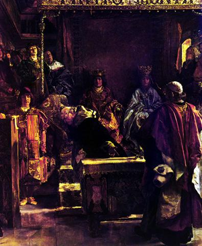 La Expulsión de los Sefardíes